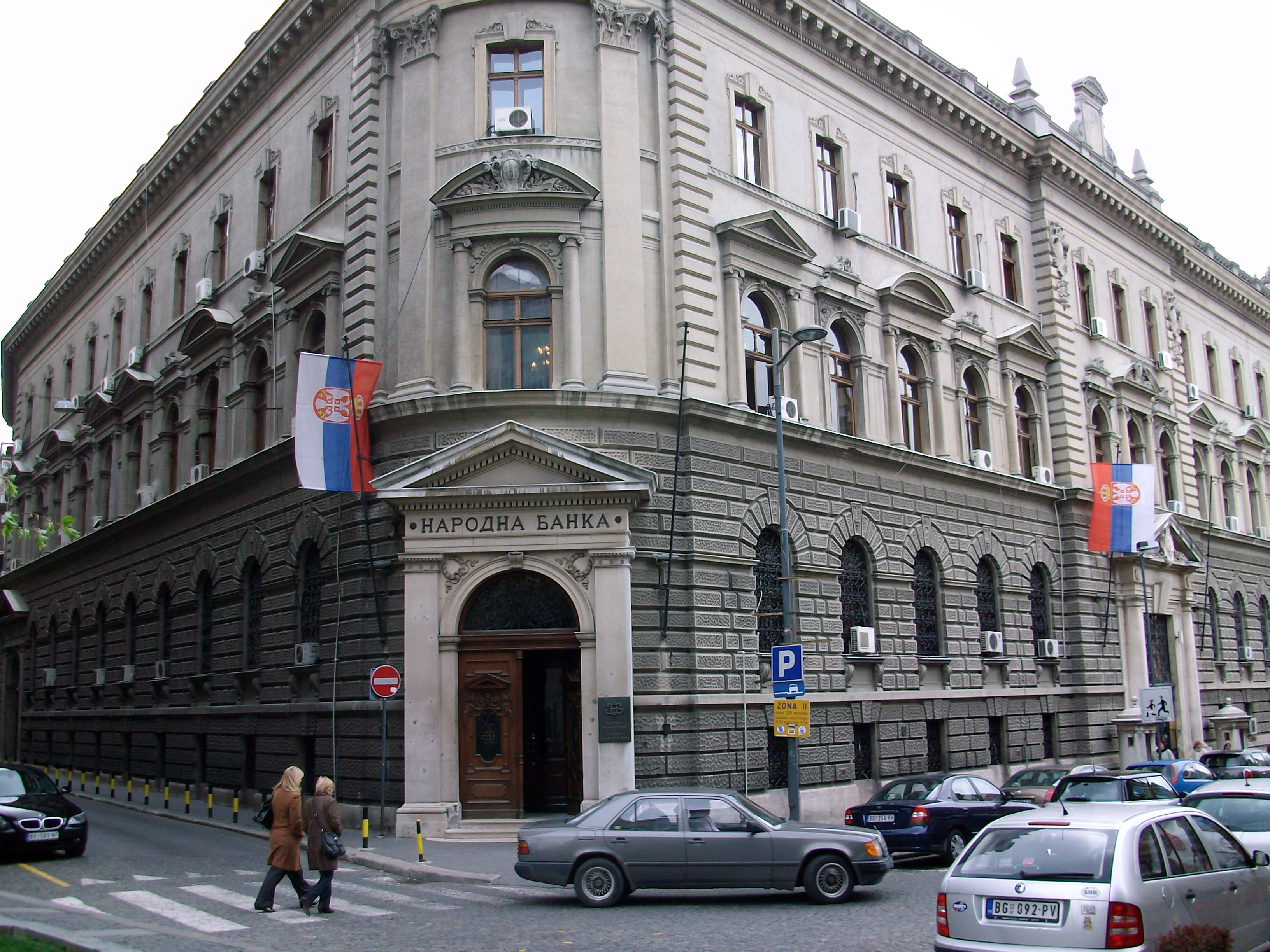 Зграда Народне банке Србије / Main building of National bank of Serbia